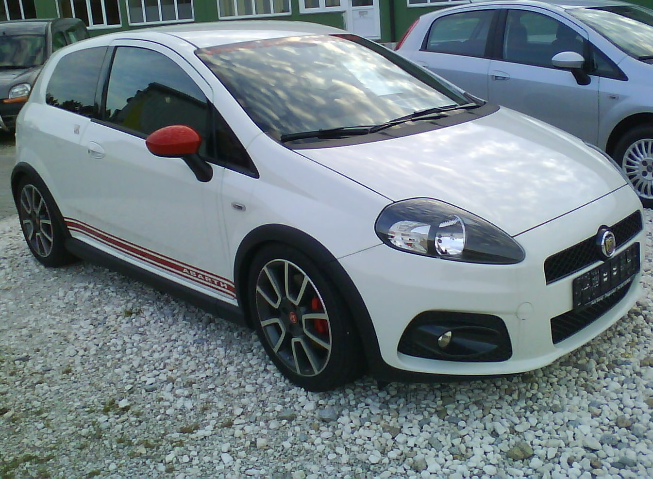 Abarth Grande Punto 155 PS